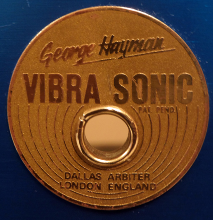 SAMSUNG CAMERA PICTURES